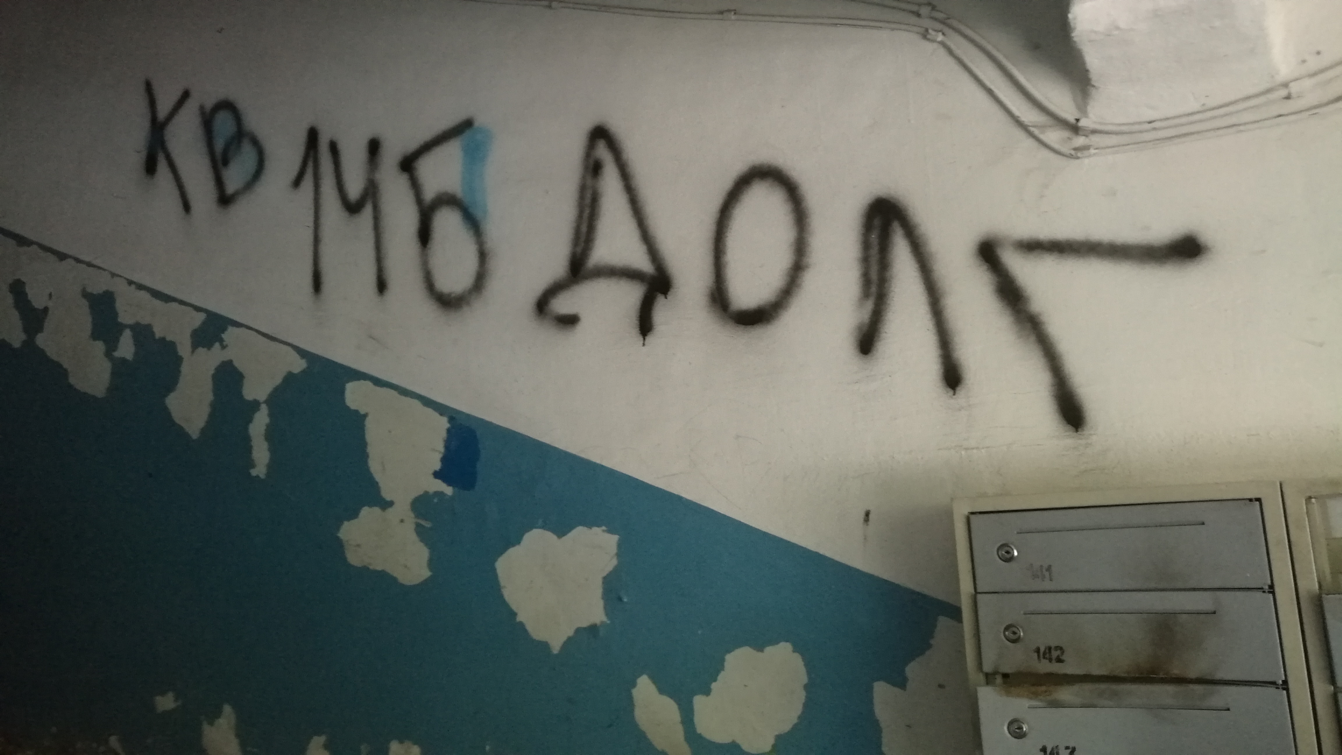 Surskribo fare de ŝuldopagiga agentejo en ŝtuparejo de loĝdomo en strato Fabriĉnaja 17: "Apartamento 145 ŝuldo". Tjumeno, Rusio.